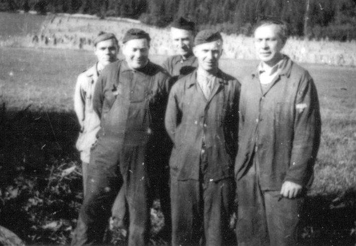 Falstadfanger ved smia på Falstad skolehjem. Fra venstre står rørlegger Roy Gjørtz og smedene Ole Kjennerud, Gunvald Engelstad, Arvid Alstad og Tormod Hegdal. Falstad prisoners near the blacksmith workshop at Falstad reformative school. From the left plumber Roy Gjørtz, blacksmiths Ole Kjennerud, Gunvald Engelstad, Arvid Alstad and Tormod Hegdal. Dato / Date: 1944 Fotograf / Photographer: ukjent / unknown Sted / Place: Ekne, Nord-Trøndelag, Norge/Norway Arkivreferanse /Archive reference: FSM foto 0700393